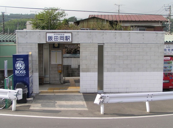 Iidaoka Station, on the Izuhakone Daiyūzan Line, Odawara, Kanagawa 飯田岡駅